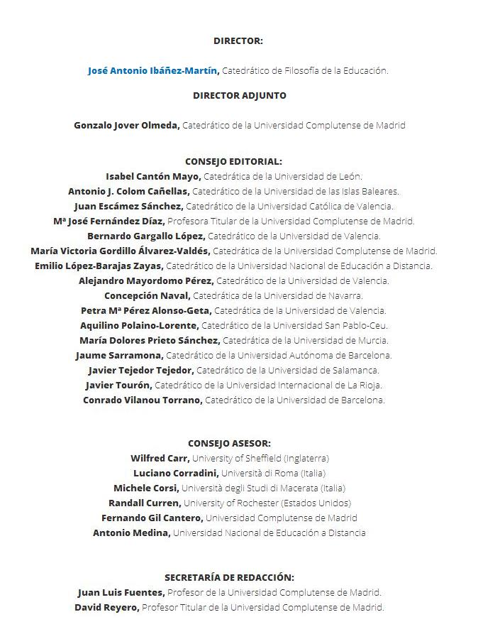 Equipo Editorial Revista Española de Pedagogía